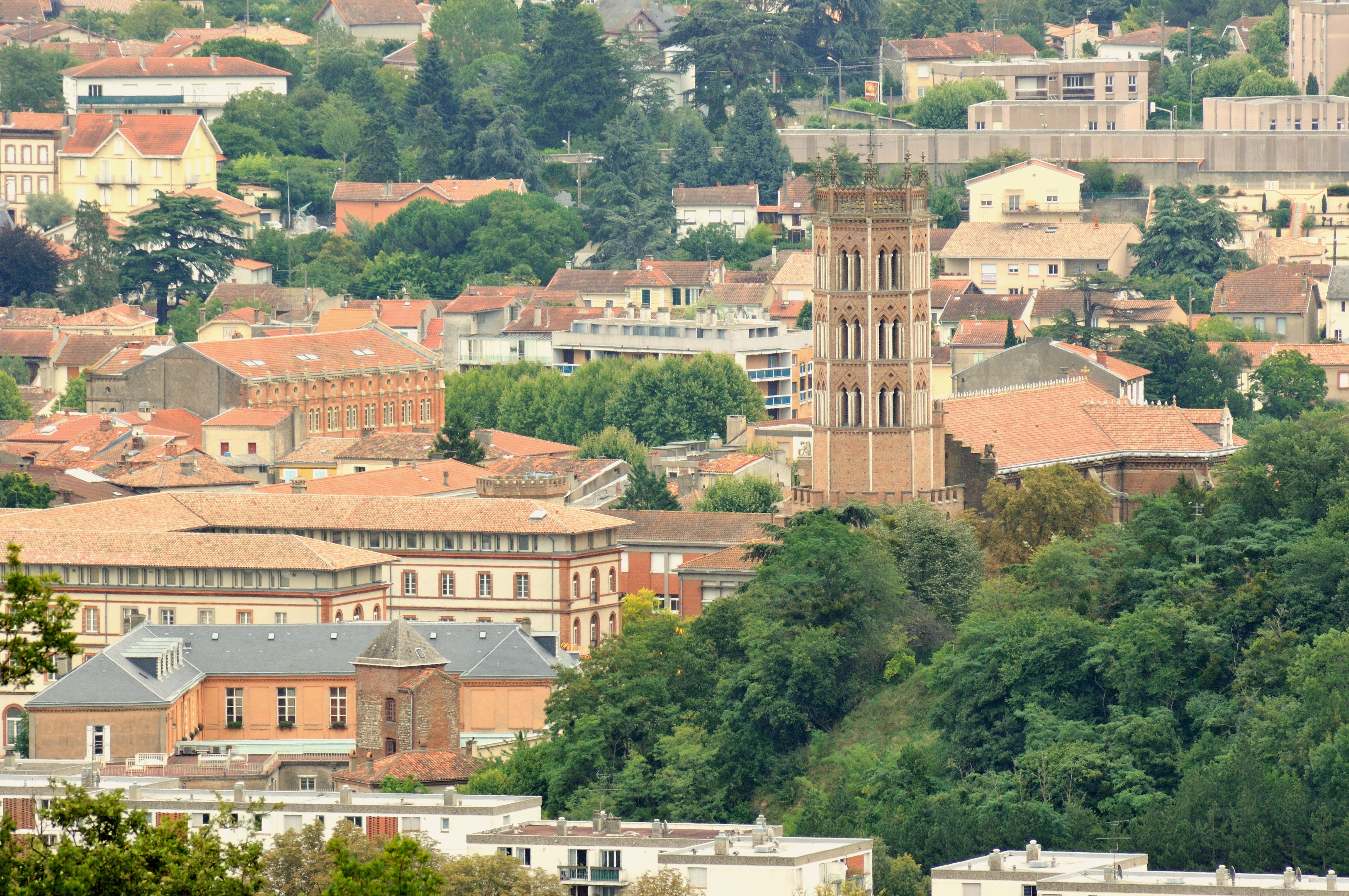 La ville de Pamiers (Ariège, Midi-Pyrénées, France) vue des coteaux : la cathédrale, le lycée, la mairie, la porte de Nerviaux.